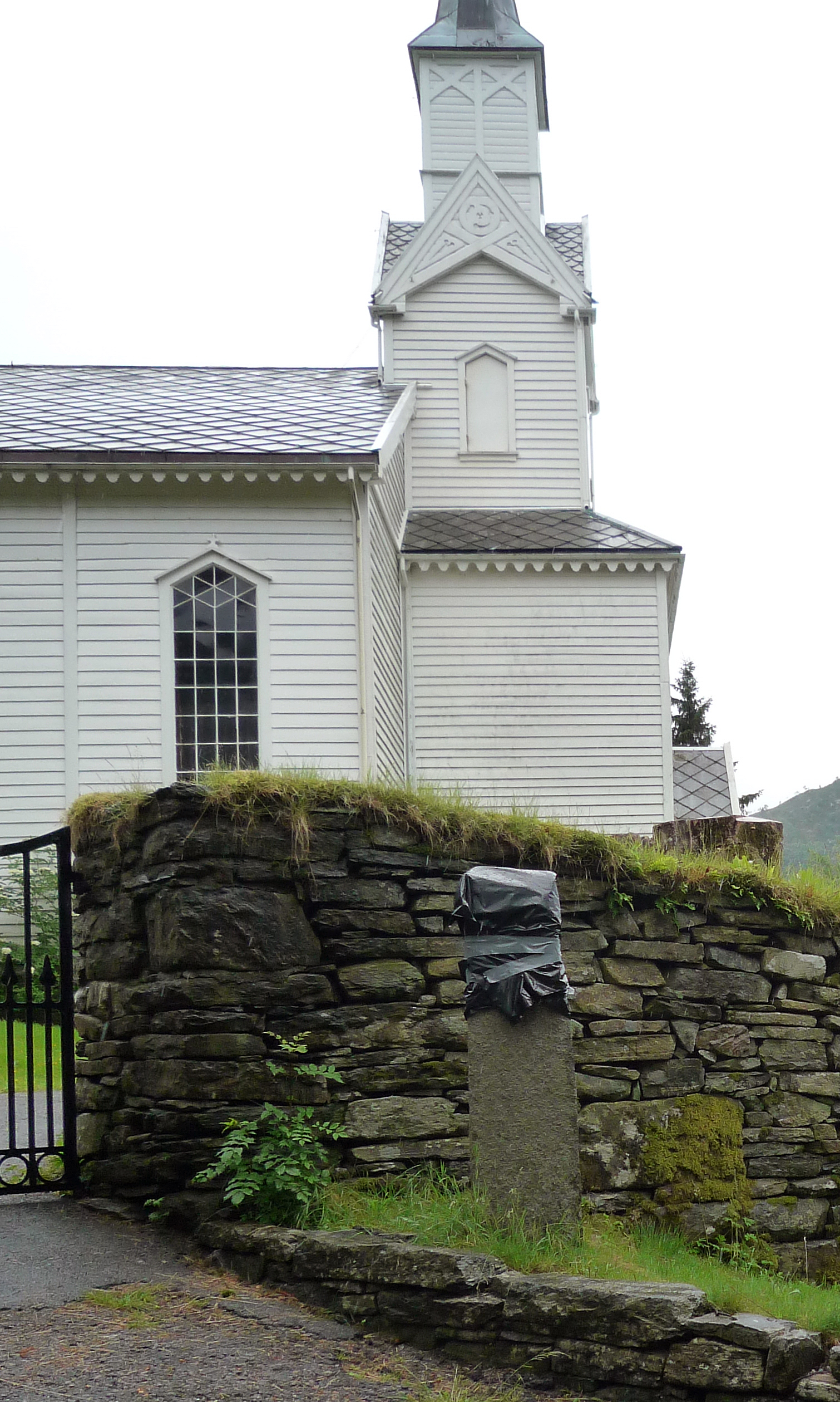 Steinkorsene i Eivindvik